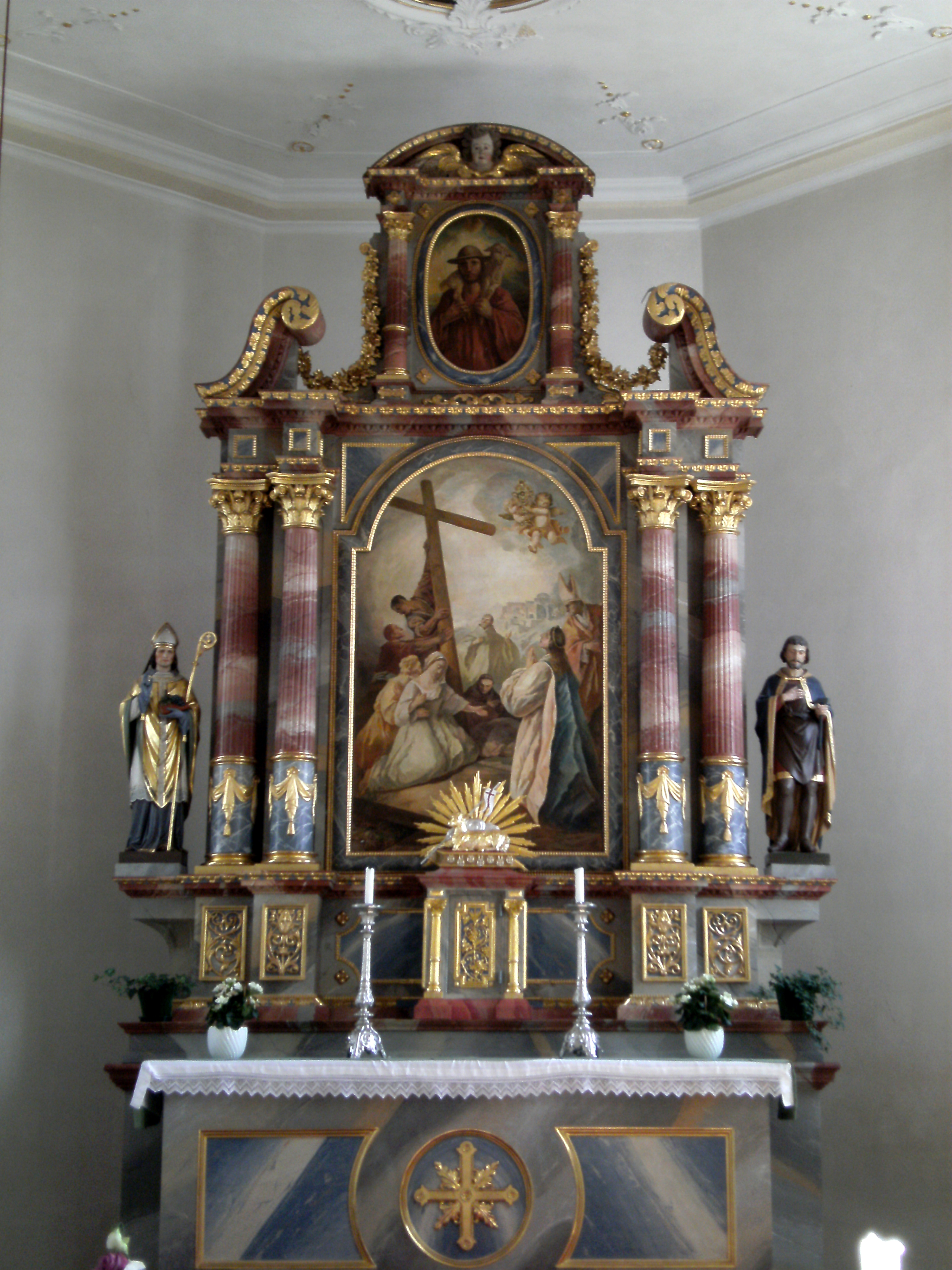 Heilig Kreuz Kirche (Allmannsweiler)